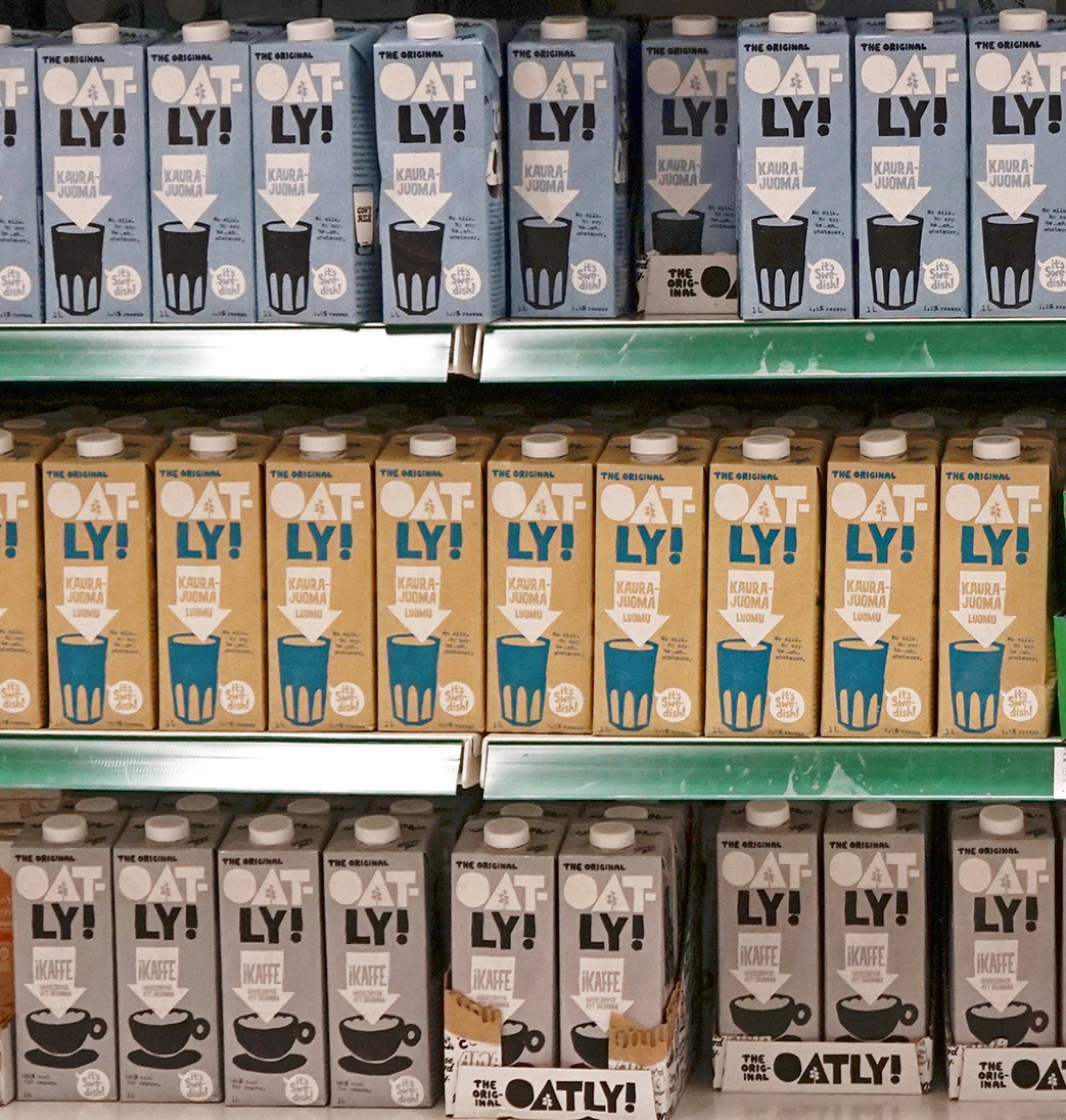 Oatlyn kaurajuomia Keljon Primassa Jyväskylässä.